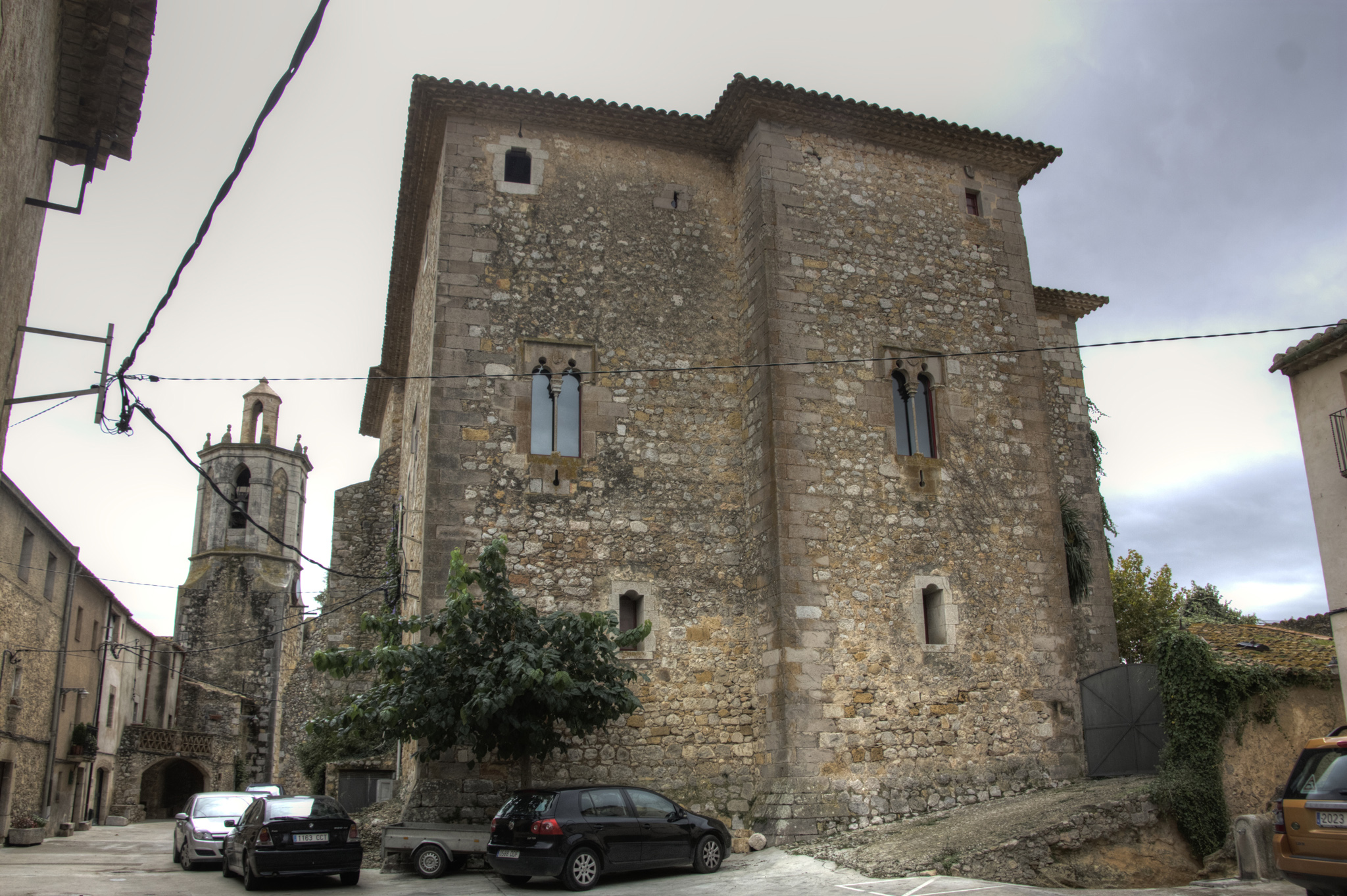 Castell de Sant Mori